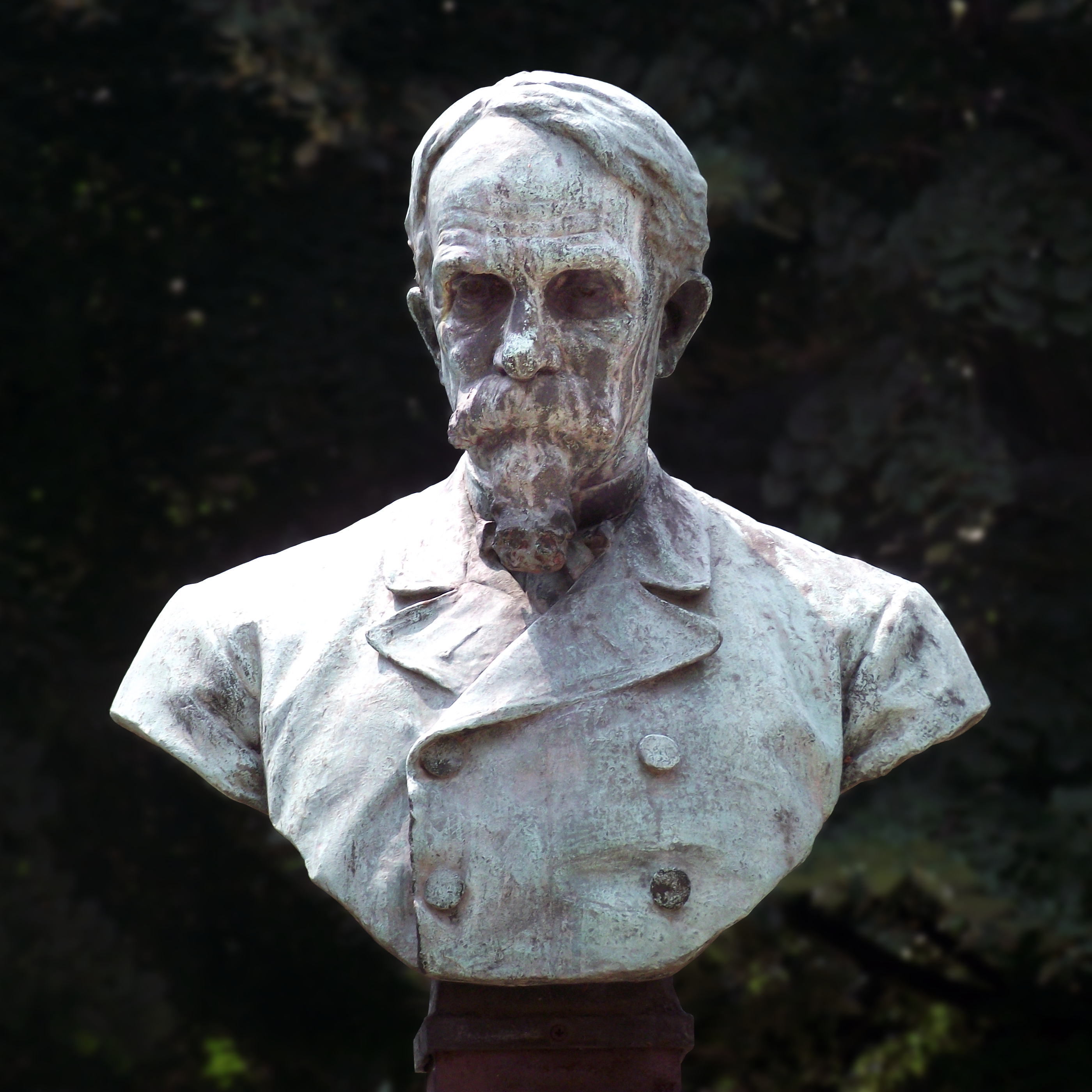 busto di Gaetano Cantoni agronomo opera di Ercole Villa, presso Università di agraria Milano